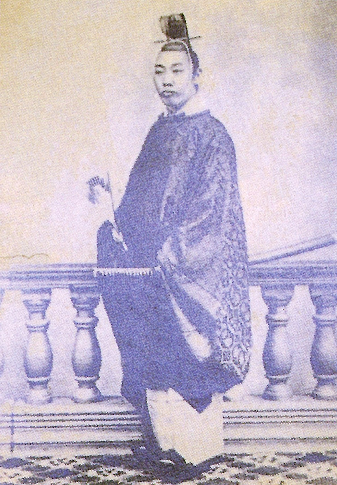 多久茂族の肖像。